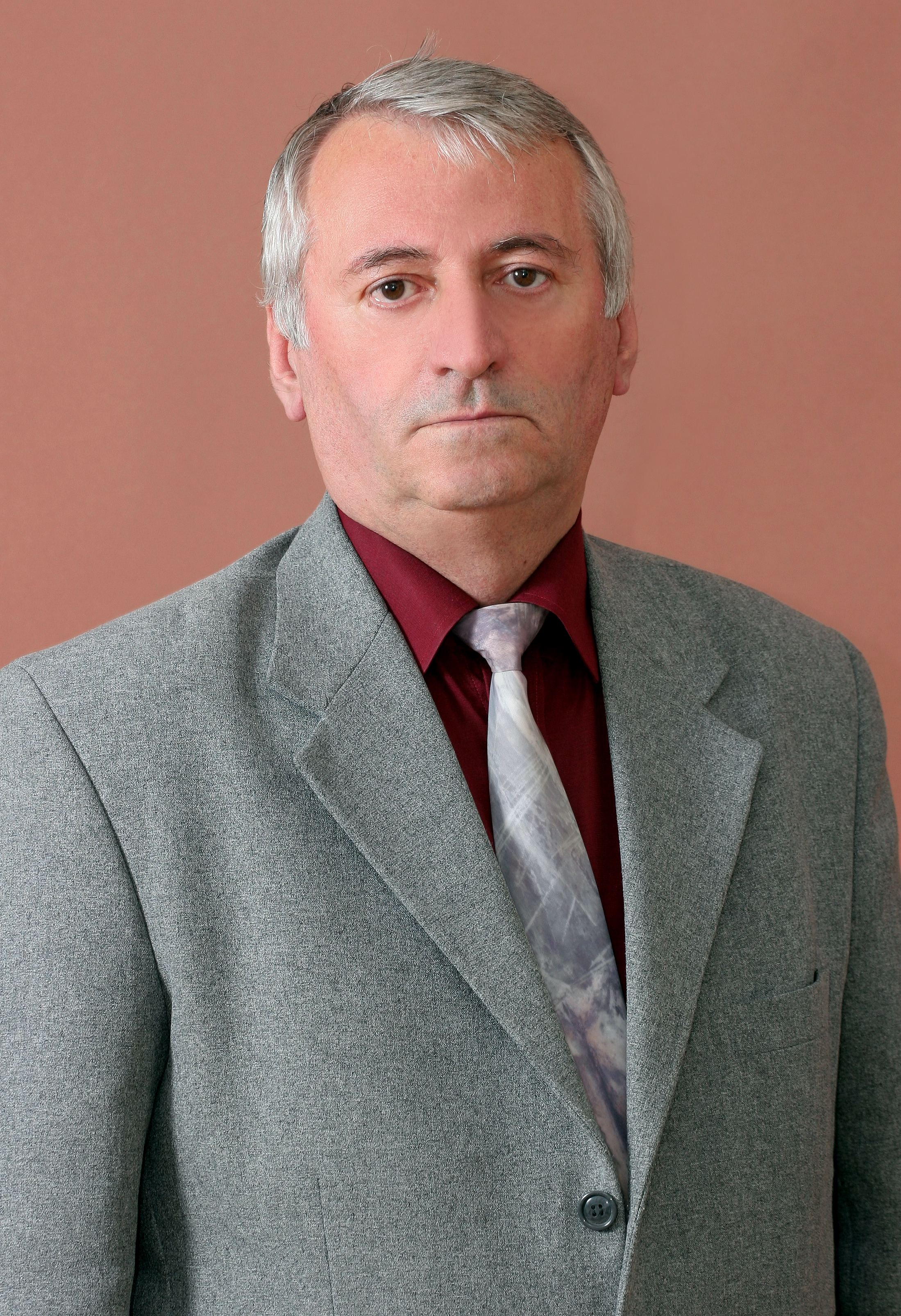 conf.univ.dr. Coriolan PĂUNESCU